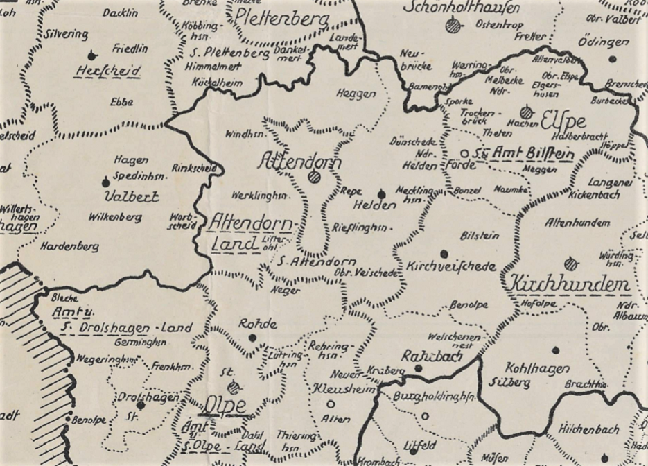 Stadt Attendorn und Gemeinde Attendorn-Land in einer Übersichtskarte um 1930 (Regierungs Bezirk Arnsberg). Beschreibung: „1 : 200.000 – 61 x 76 – Druck: Kartographischer Verlag, Münster – B Nr. 423a“.